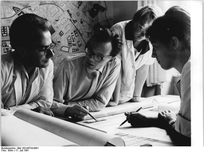 Berlin, Architekten an Entwurf arbeitend Zentralbild Stöhr 17.7.1961 Junge Architekten projektieren für das Berliner Stadtzentrum. Ein Jugendkollektiv in VEB Berlin-Projekt, dem sechs Architekten und zwei technische Zeichnerinnen angehören, wird für das Stadtzentrum der Hauptstadt Projektierungsarbeiten übernehmen. Dem Kollektiv, das unter der Leitung des Architekten Peter Senf steht, wurde als erstes die Aufgabe übertragen, ein Verwaltungsgebäude für eine Abteilung des Deutschen Innen- und Aussenhandels zu projektieren. Es wird in der Straße Unter den Linden gegenüber der Sowjetischen Botschaft in Stahlbetonskelett-Montagebauweise errichtet. UBz: Dipl. Ing. joachim Dobbrick, Dipl.-Ing. Peter Senf, die techn. Zeichnerin Renata Oertell und Dipl. Ing. Dora Mertsching arbeiten an einem Entwurf.